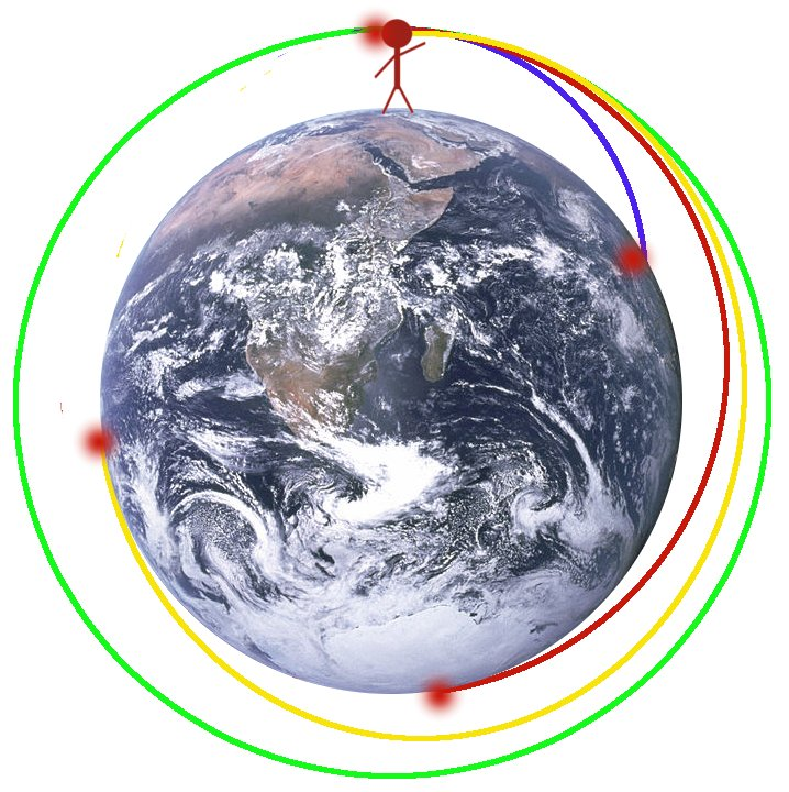 ഉപഗ്രഹം ഭൂമിയെ ചുറ്റിക്കറങ്ങുന്നത് എങ്ങിനെ എന്ന് വിശദമാക്കുന്ന ചിത്രം